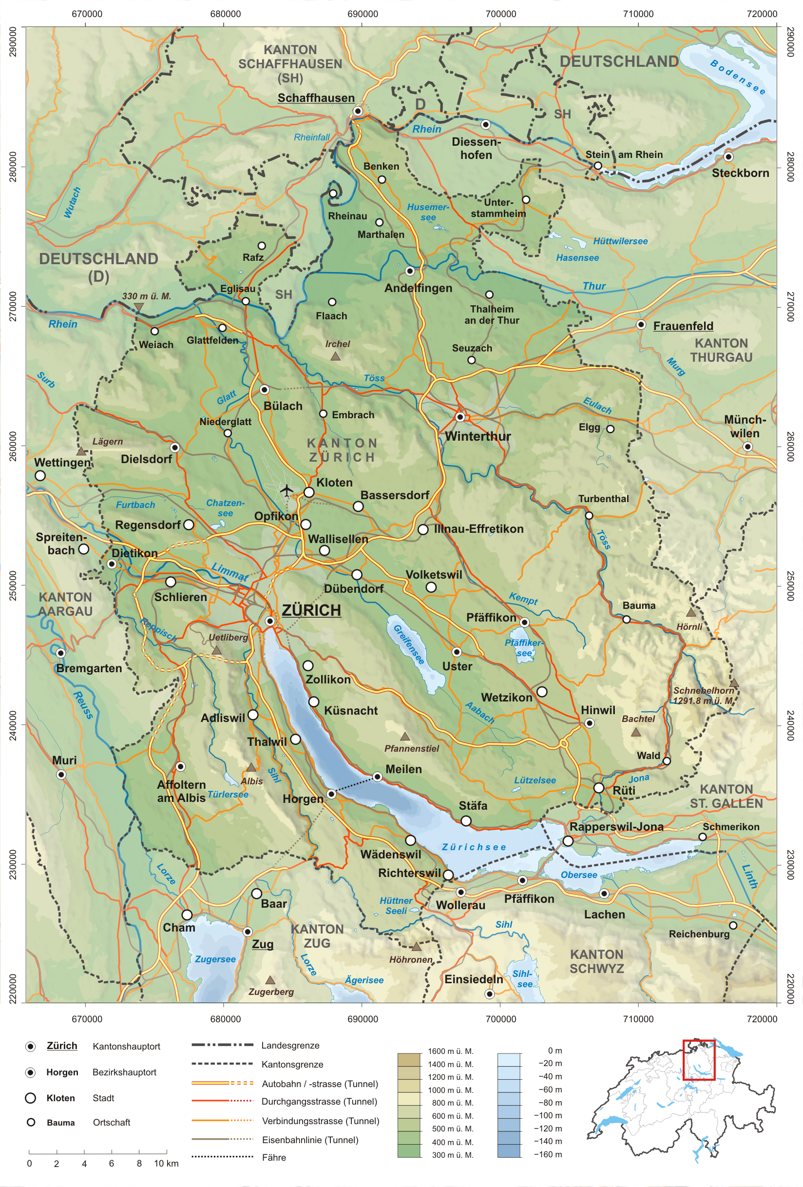 Karte des Kanton Zürich. Topographischer Hintergrund: NASA Shuttle Radar Topography Mission (public domain). SRTM3 v.2.